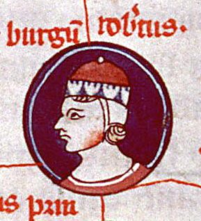 Robert le Fort représenté en médaillon dans un arbre généalogique (détail d'une enluminure du XIVe siècle).